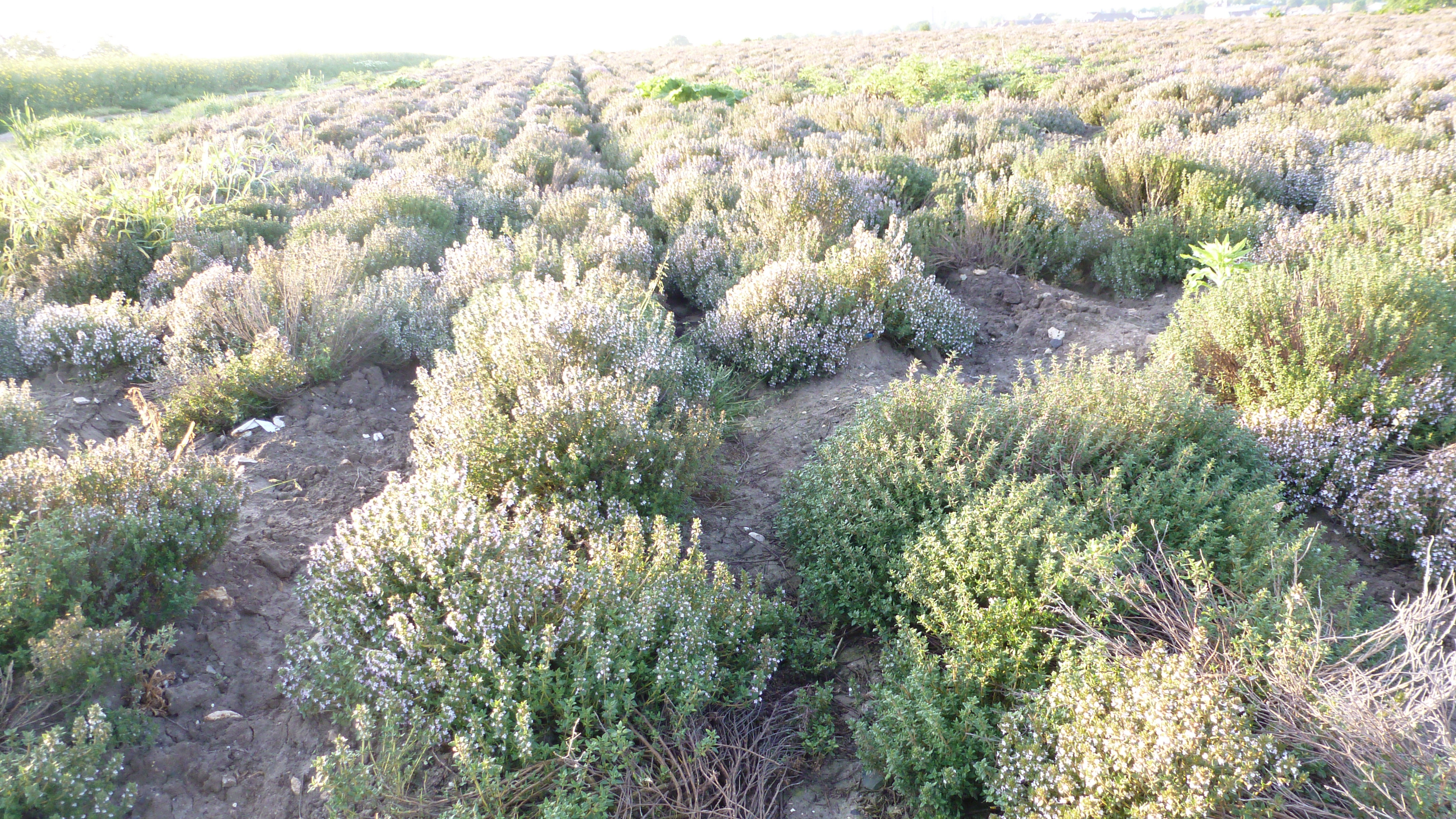 champ de thym en fleur